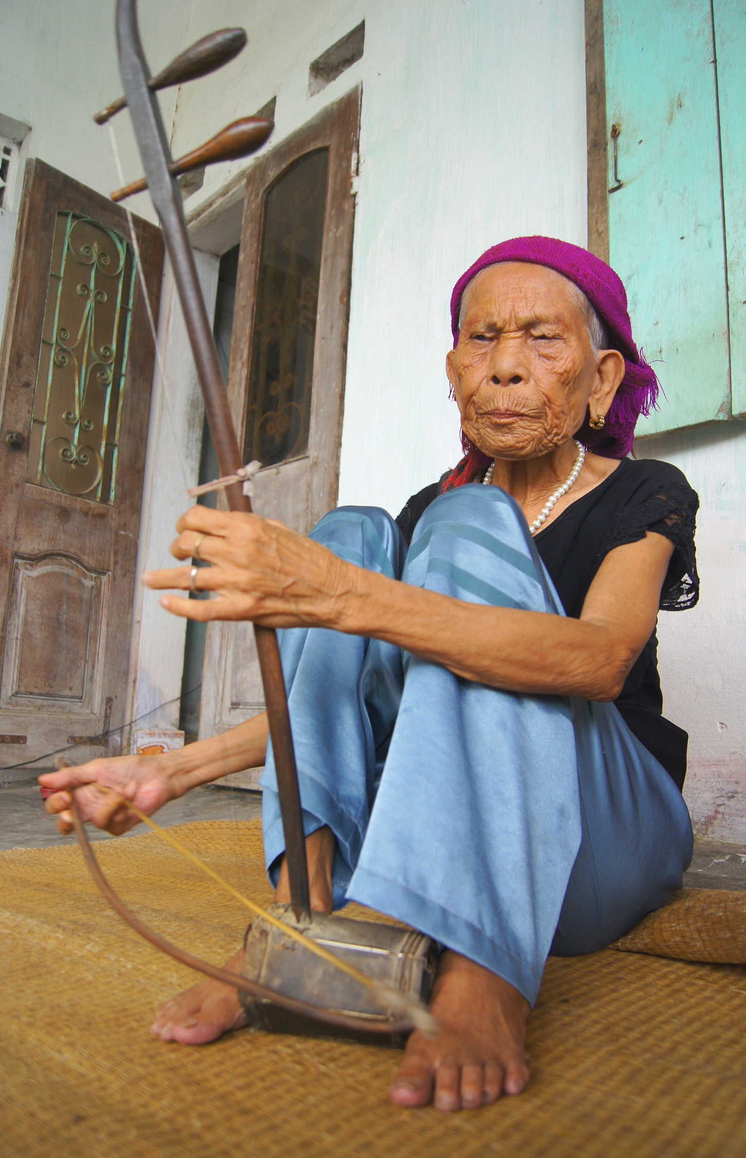 Nghệ nhân hát xẩm Hà Thị Cầu